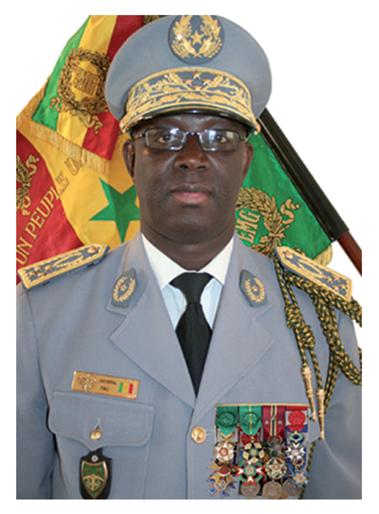 Chef d'Etat-major des Armées du Sénégal